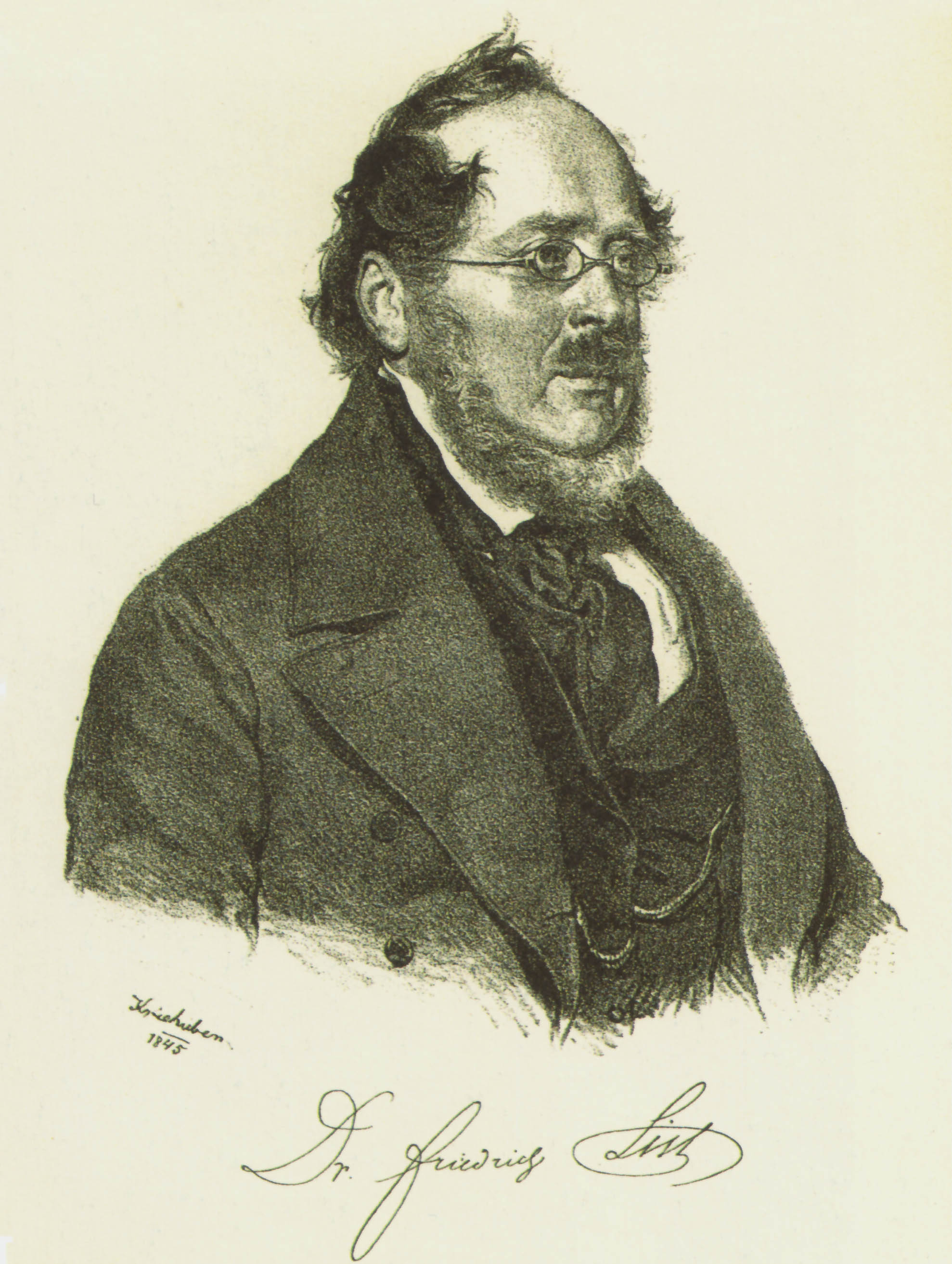 Friedrich List (1789-1846), Gründer des Deutschen Handels- und Gewerbevereins. (HStA J 300 Nr. 89)